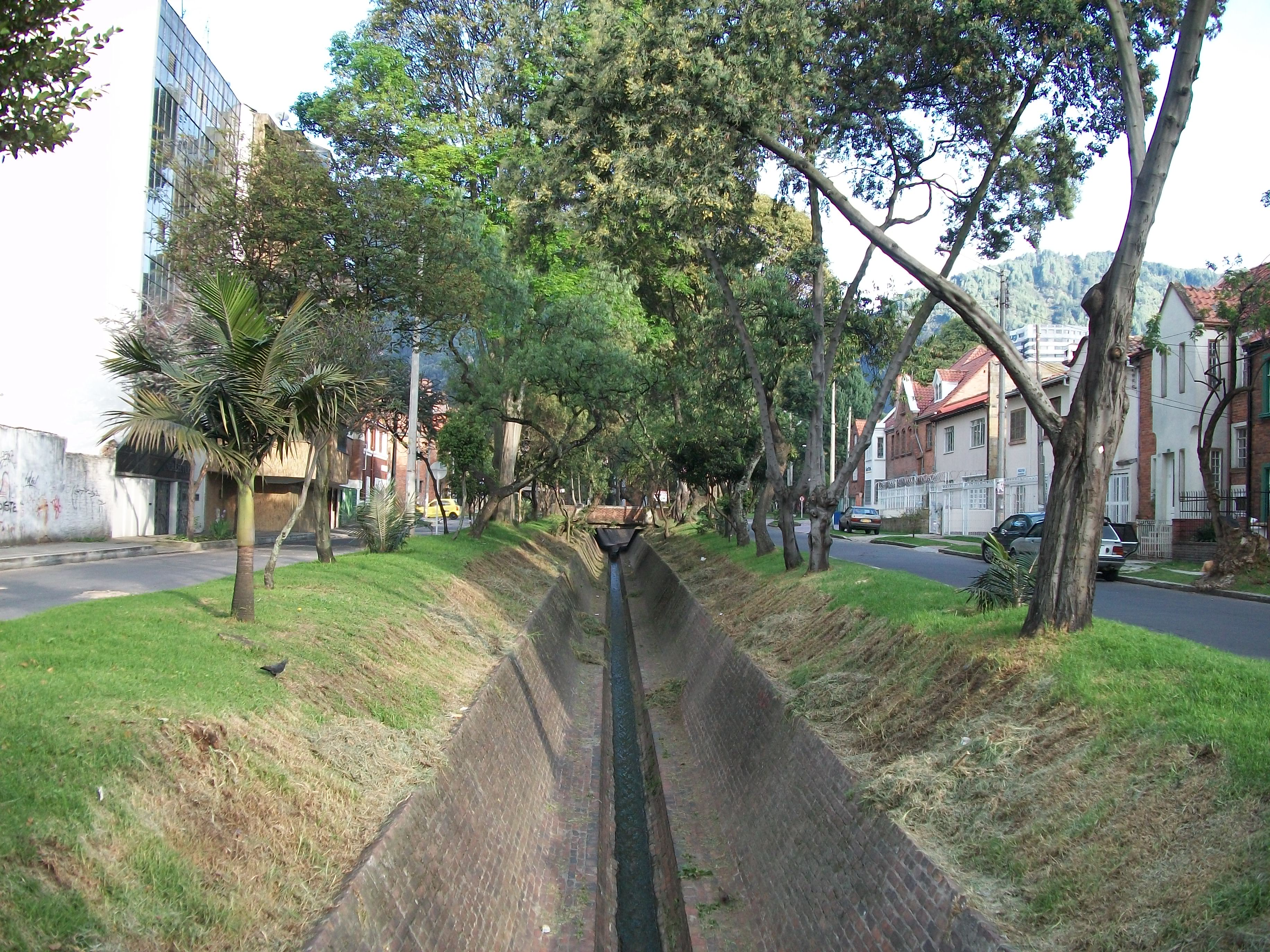 Canal-río Arzobispo en el barrio Teusaquillo. Bogotá.